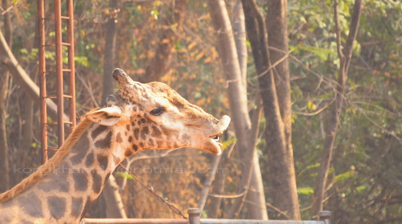 การแสดงสีหน้า ที่ใบหน้าเมื่อยีราฟเพศผู้ เมื่อทดสอบการเป็นสัดของเพศเมีย Fleshmen